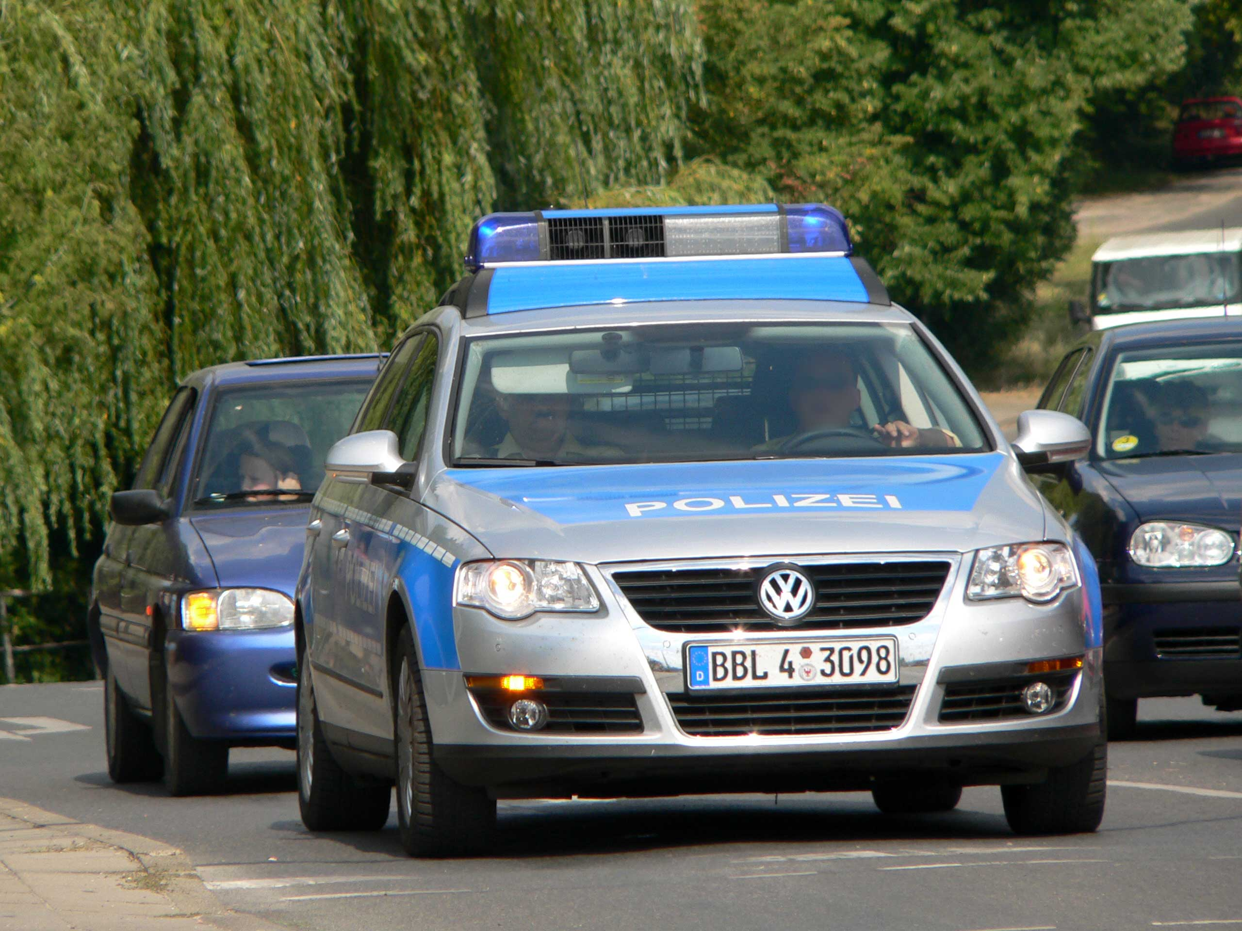 BBL-Kennzeichen